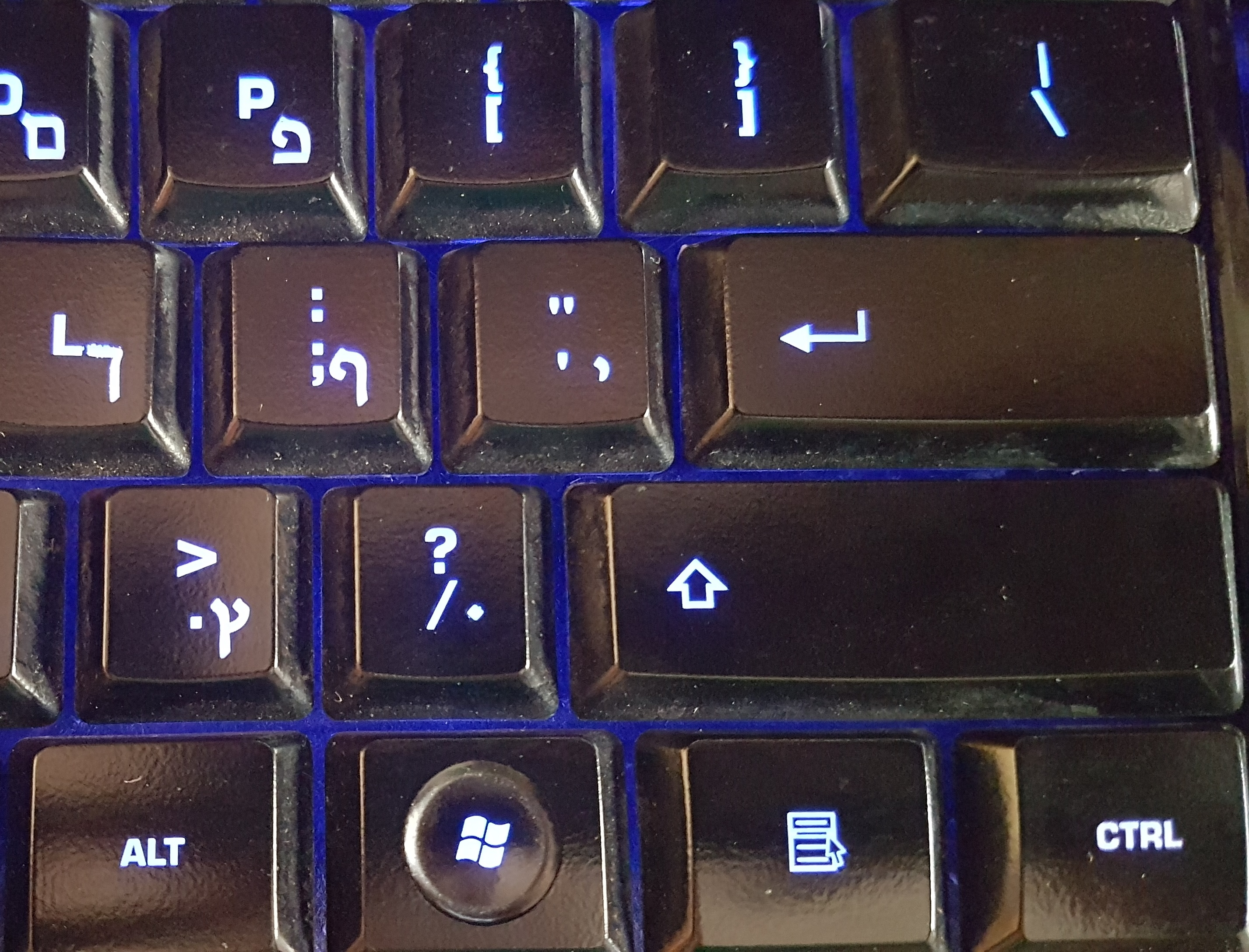 צילום של חלק ממקשי המקלדת וביניהם חלק ממקשי הפקודה